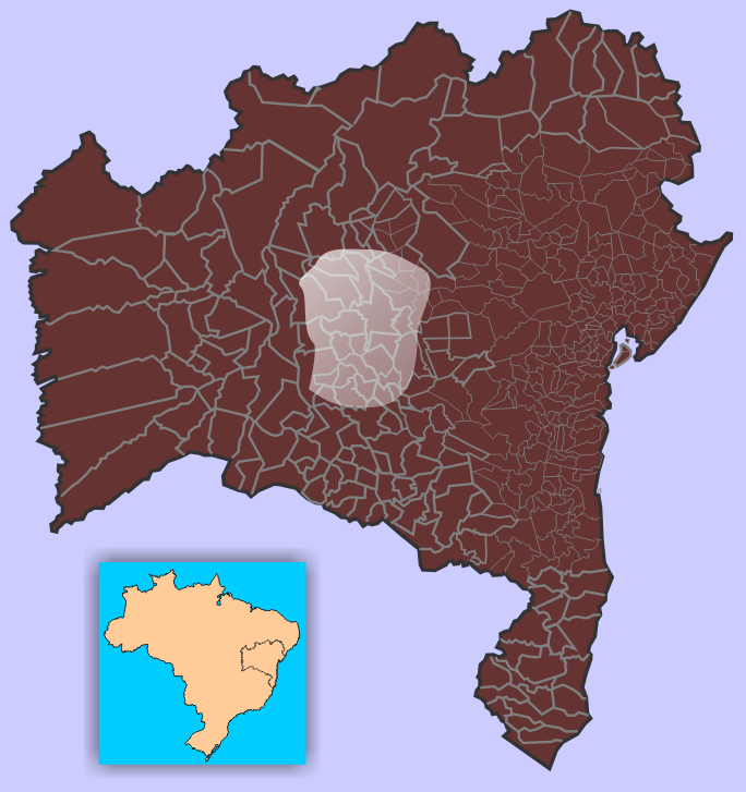 Mapa da Bahia (atualizado), mostrando a área sob influência direta de Horácio de Matos, em 1920.